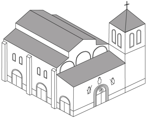 Iglesia de Santísima Trinidad (Tudela), desaparecida; reconstrucción del edificio para el siglo XVIII.